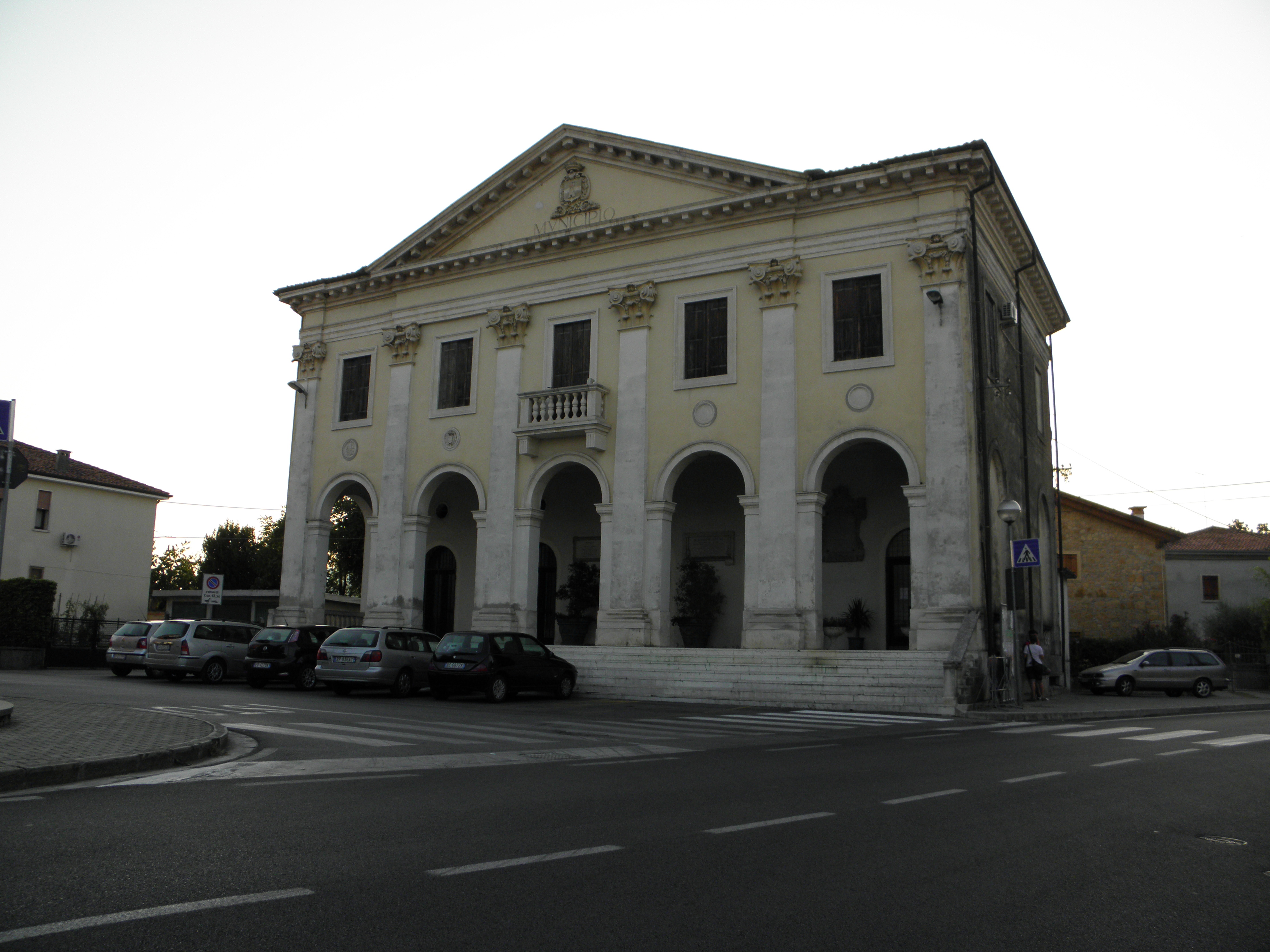 Ponte di Nanto, frazione e sede municipale del comune di Nanto: il Palazzo civico.